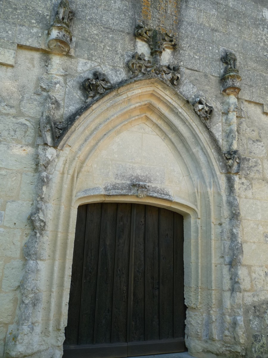 Portail de l'église de Polignac, Charente-Maritime, France